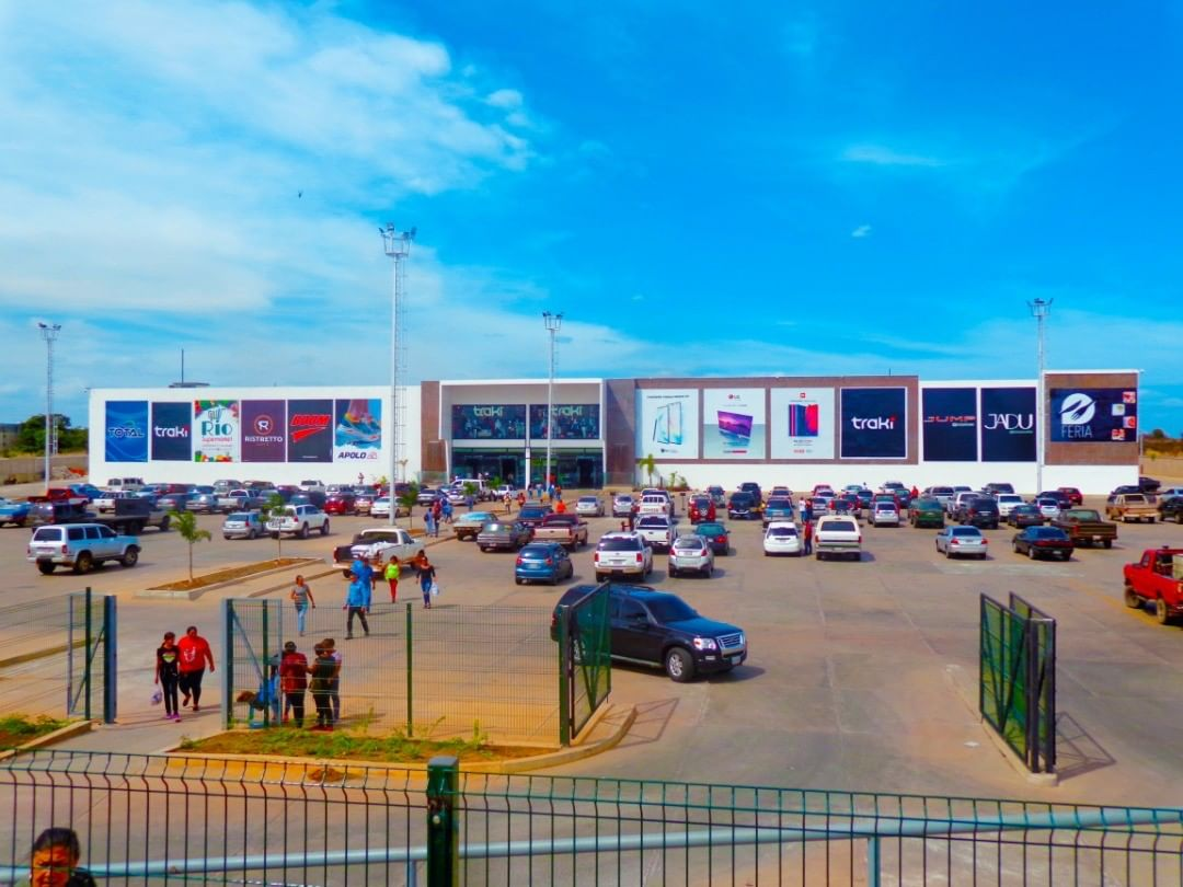 Todavía le falta en construirse, sobre todo la parte de ornato de jardines y locales comerciales.